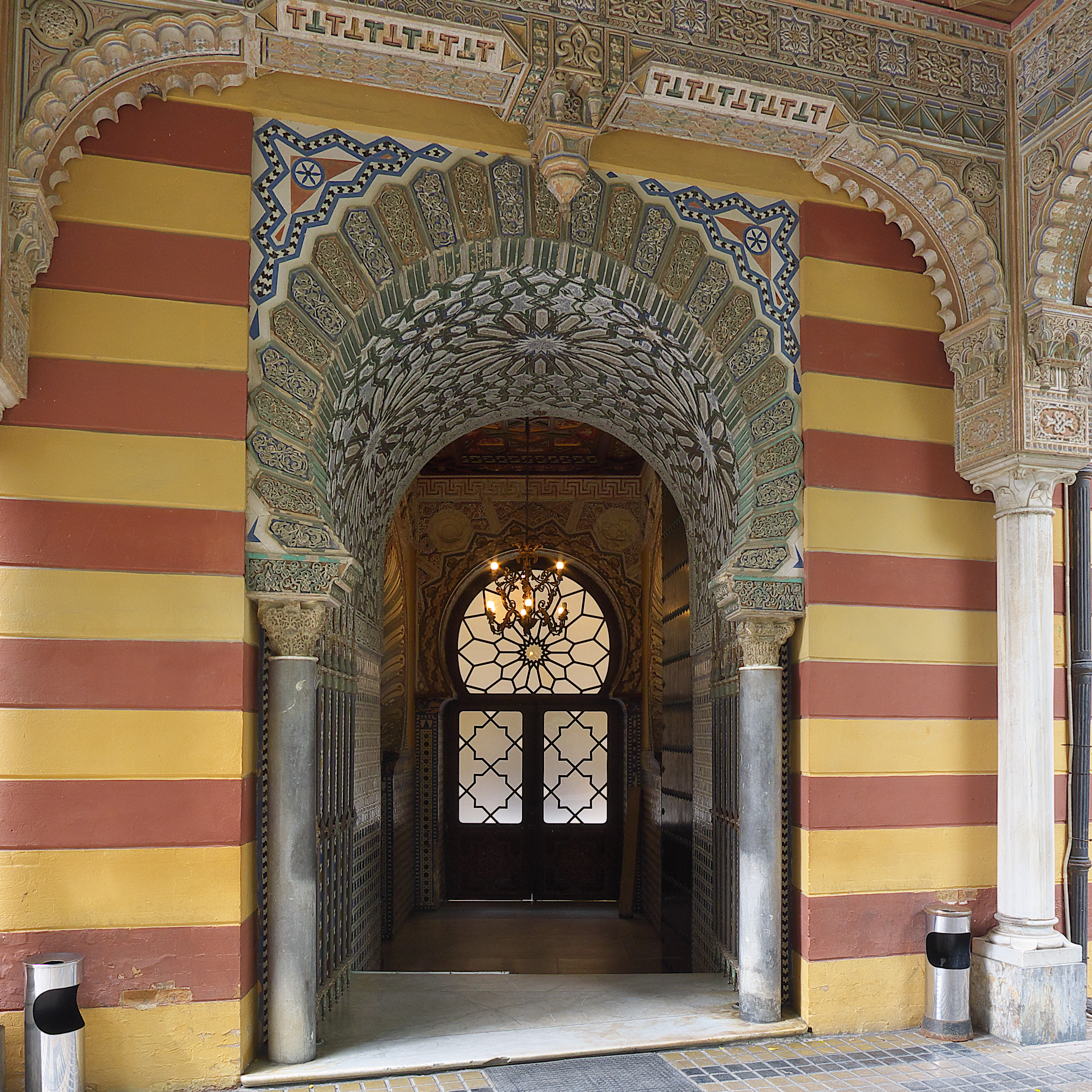 Antonio de Orleans,Duque de Montpensier, y Luisa Fernanda de Borbón y Borbón-Dos Sicilias, construyen en Sanlúcar de Barrameda (1860-1870) su residencia de verano.